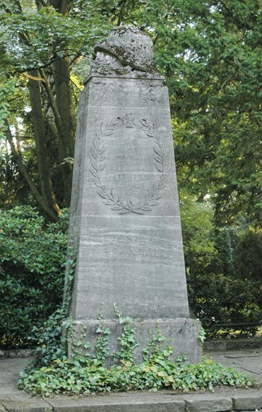 Foto Weltkriegsdenkmal In den Kisseln (Spandau). Siehe: Denkmal für die Gefallenen von 1914–1918 „In den Kisseln“ (1918) Fotografiert im Juli 2004 Benutzer:sec11 Copyright Status: GNU Freie Dokumentationslizenz